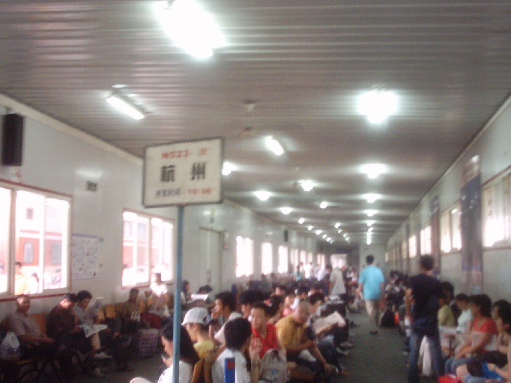 梅陇站候车室内景